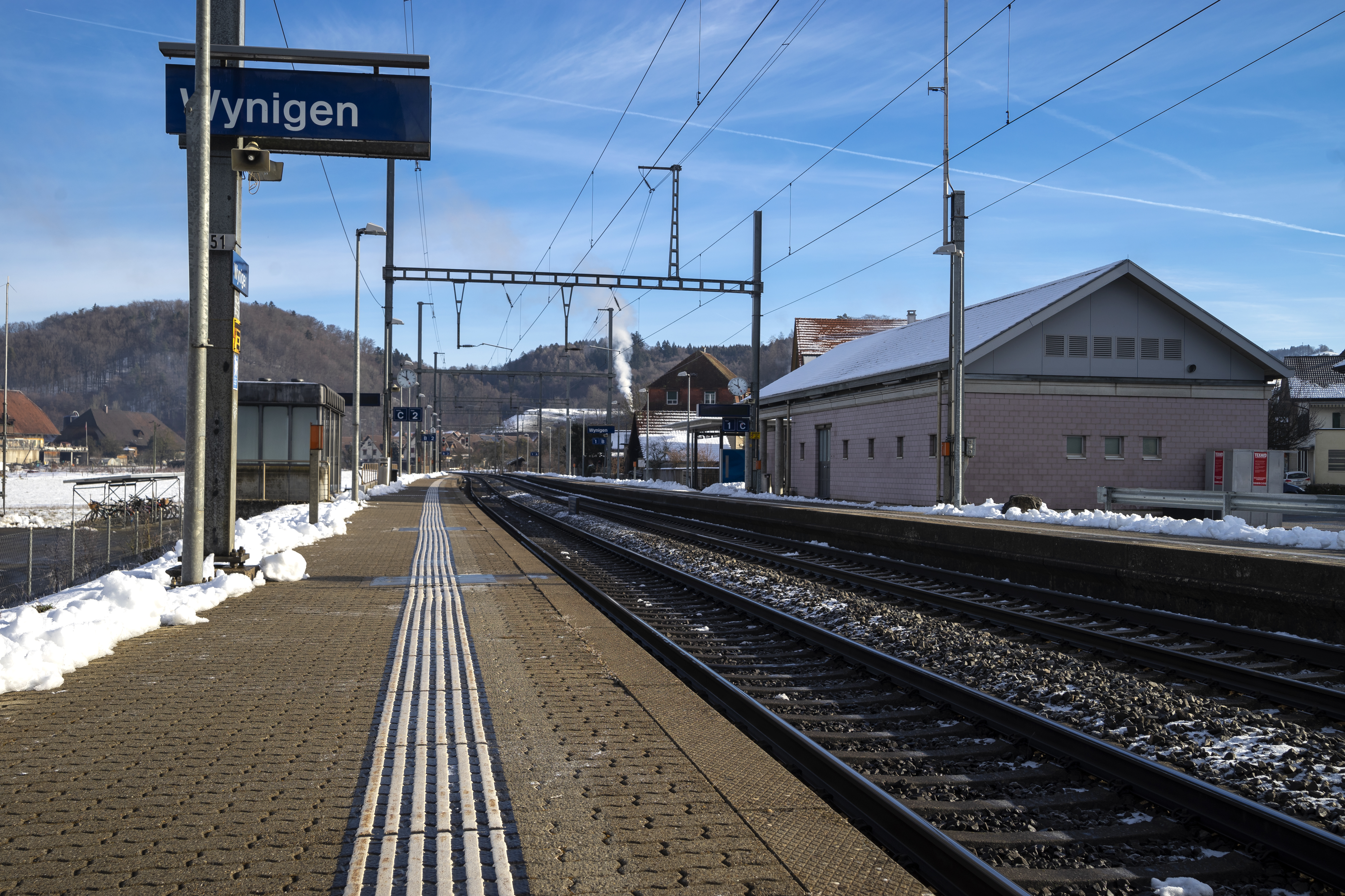 Bahnhof Wynigen